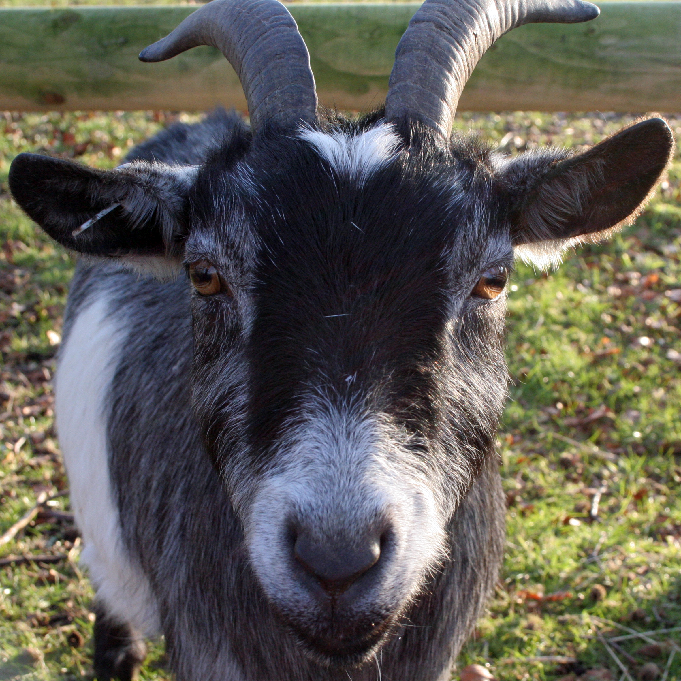 A small goat, either a pygmy or a Nigerian dwarf.